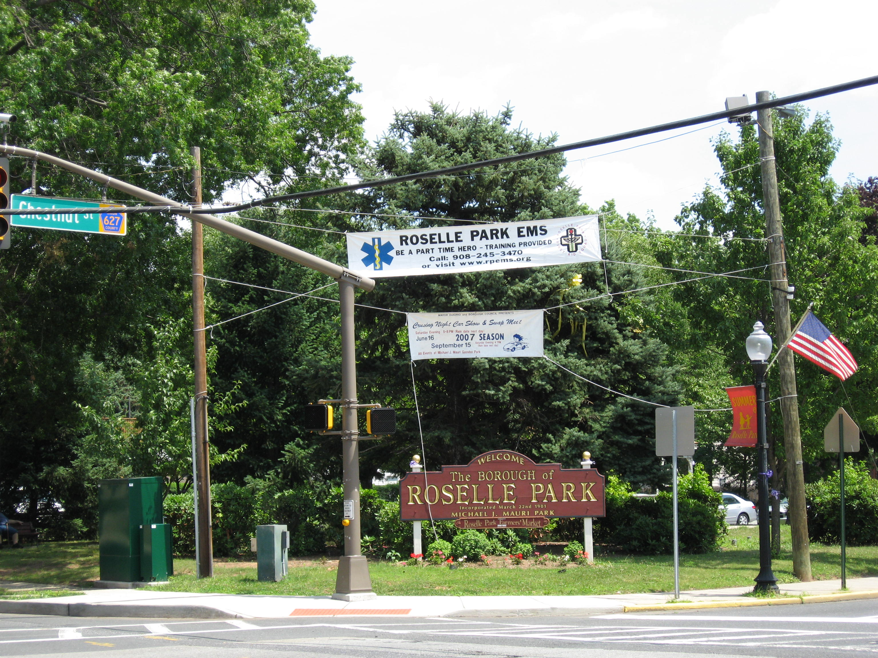 Roselle Park Welcome Sign